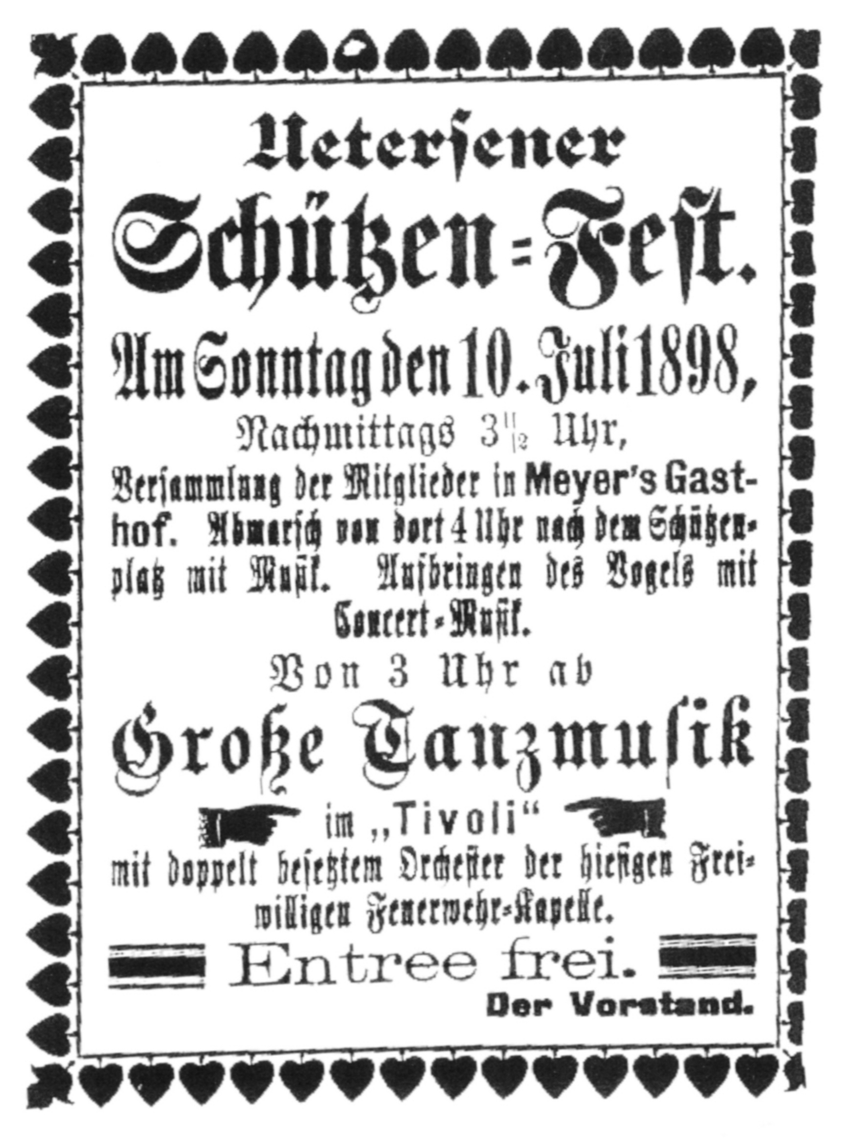 Zeitungsaunzeige für das Schützenfest in Uetersen am 10. Juli 1898.